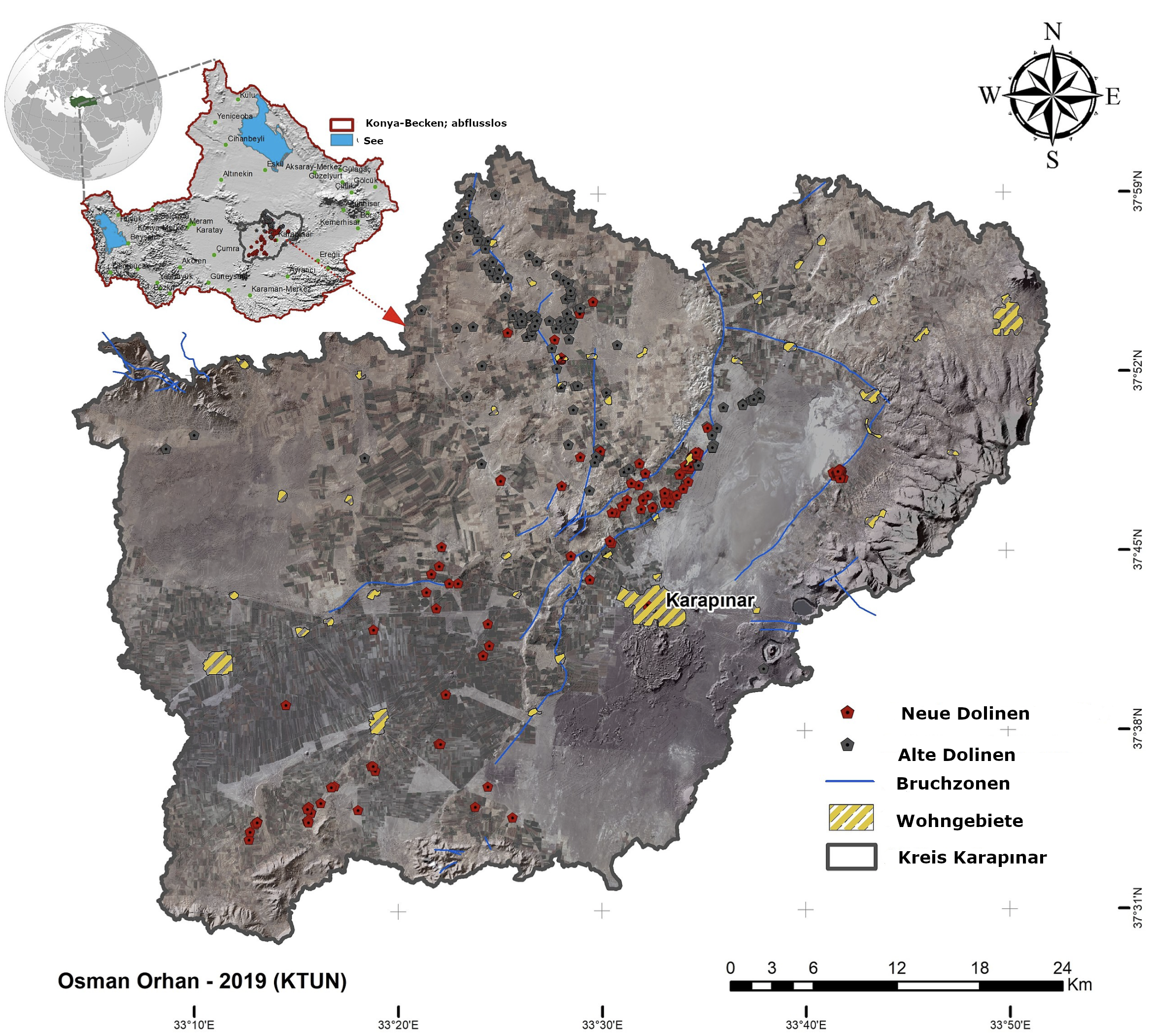 Geologische Strukturen im Kreis Karapınar.